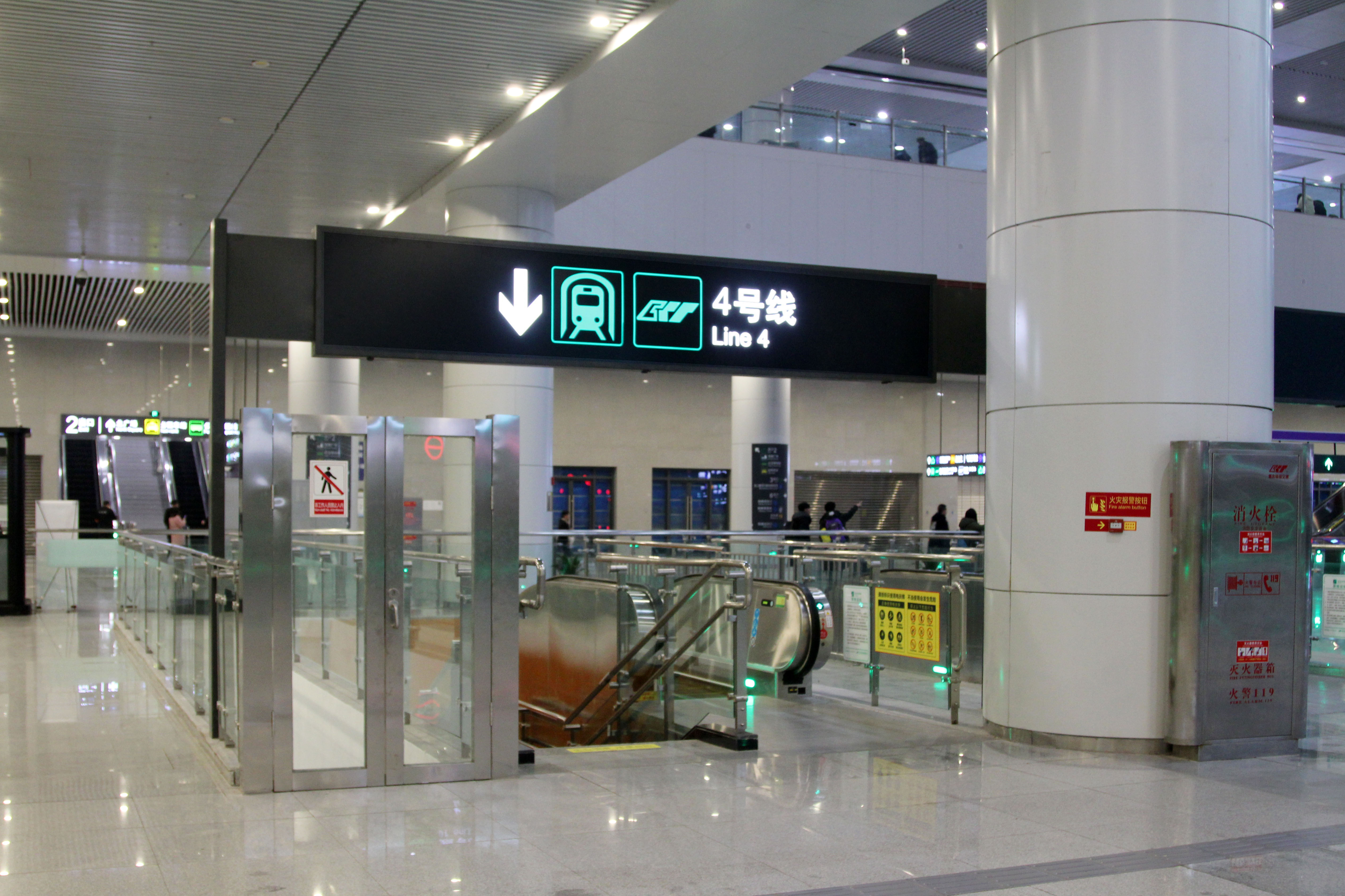 中文（中国大陆）: 重庆北站北广场交通核中的4号线入口